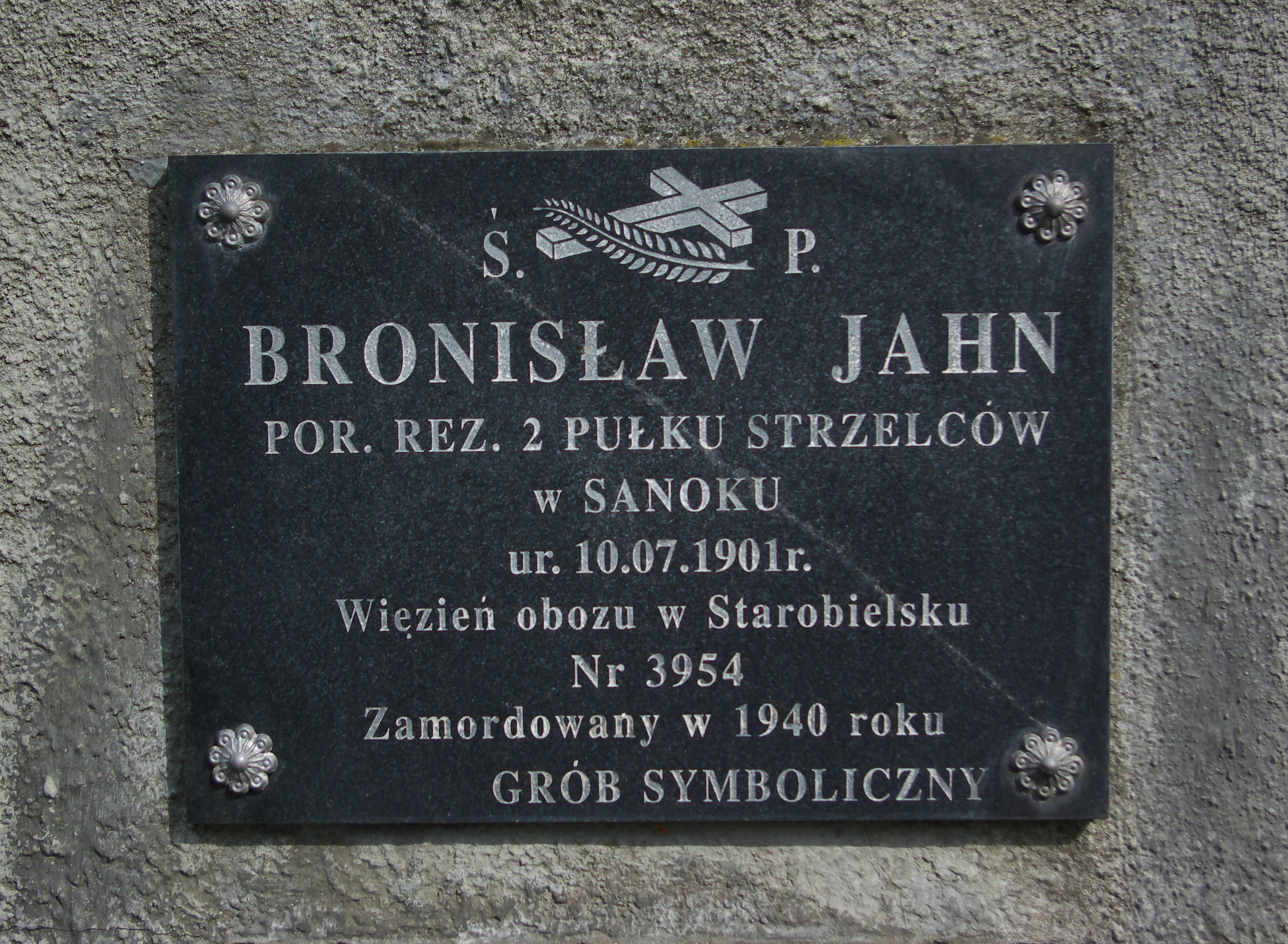 Grobowiec rodziny Jahn w części Matejki Cmentarza Centralnego w Sanoku. Bronisław Jahn